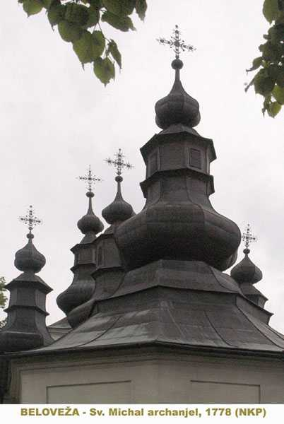 Church_Sv.Michal_Archanjel